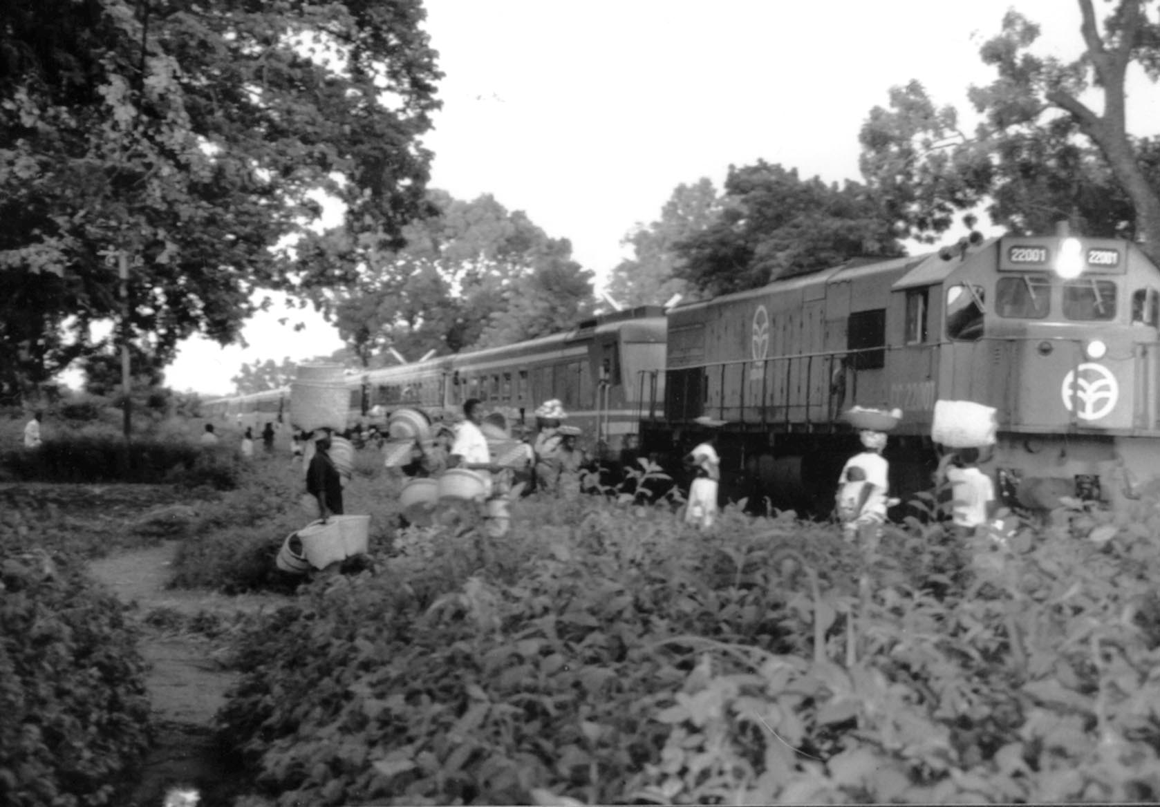 Photo personnelle, Vincent C. Arrivée du train Ouaga-Abidjan, dit "La Gazelle" à la gare de Banfora. Cette ligne est primordiale pour le commerce entre Ouagadougou et le nord de la Côte d'Ivoire.